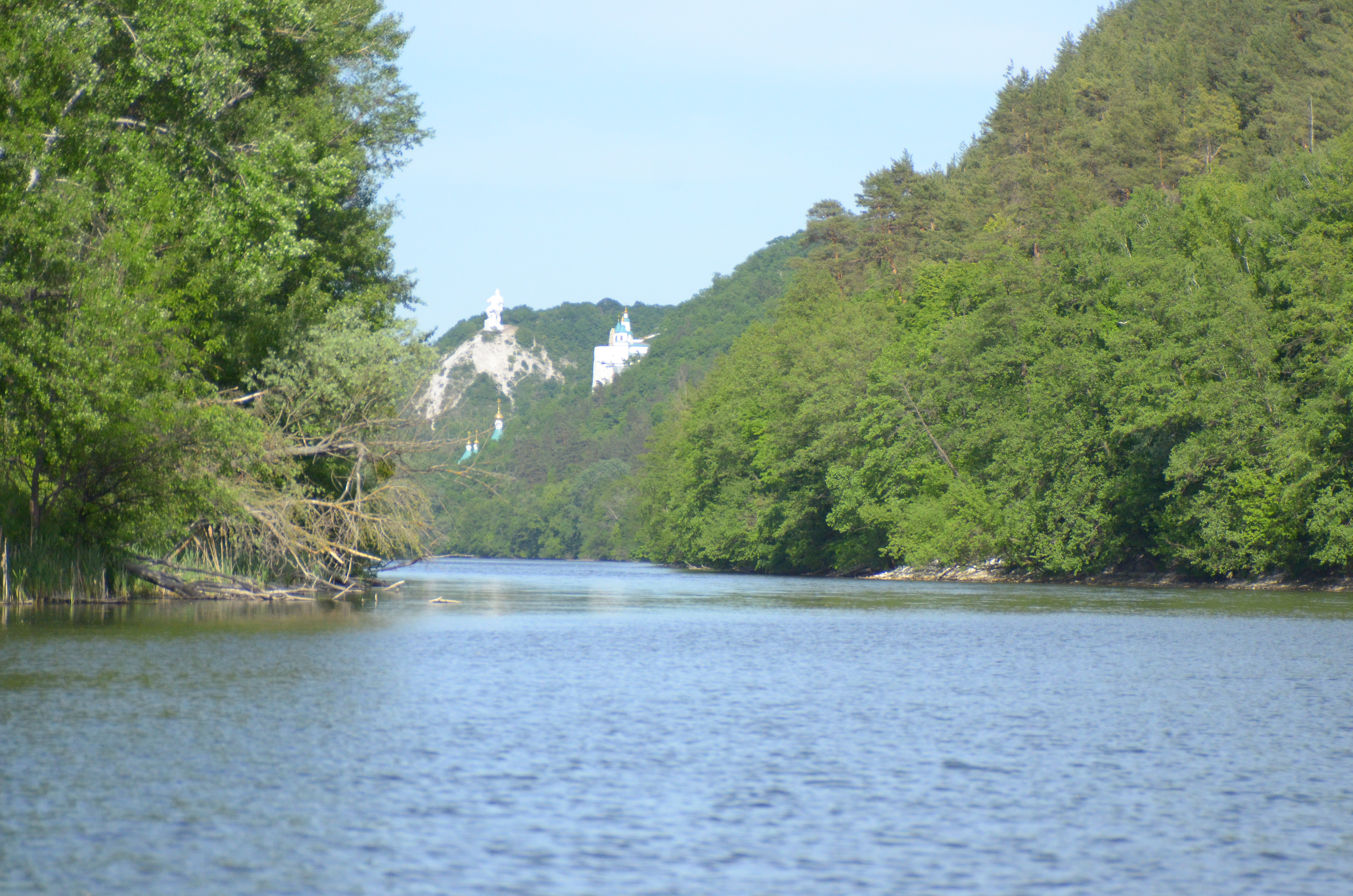 Сплав по Северскому Донцу. Начало сплава около села Студенок, окончание в Святогорске